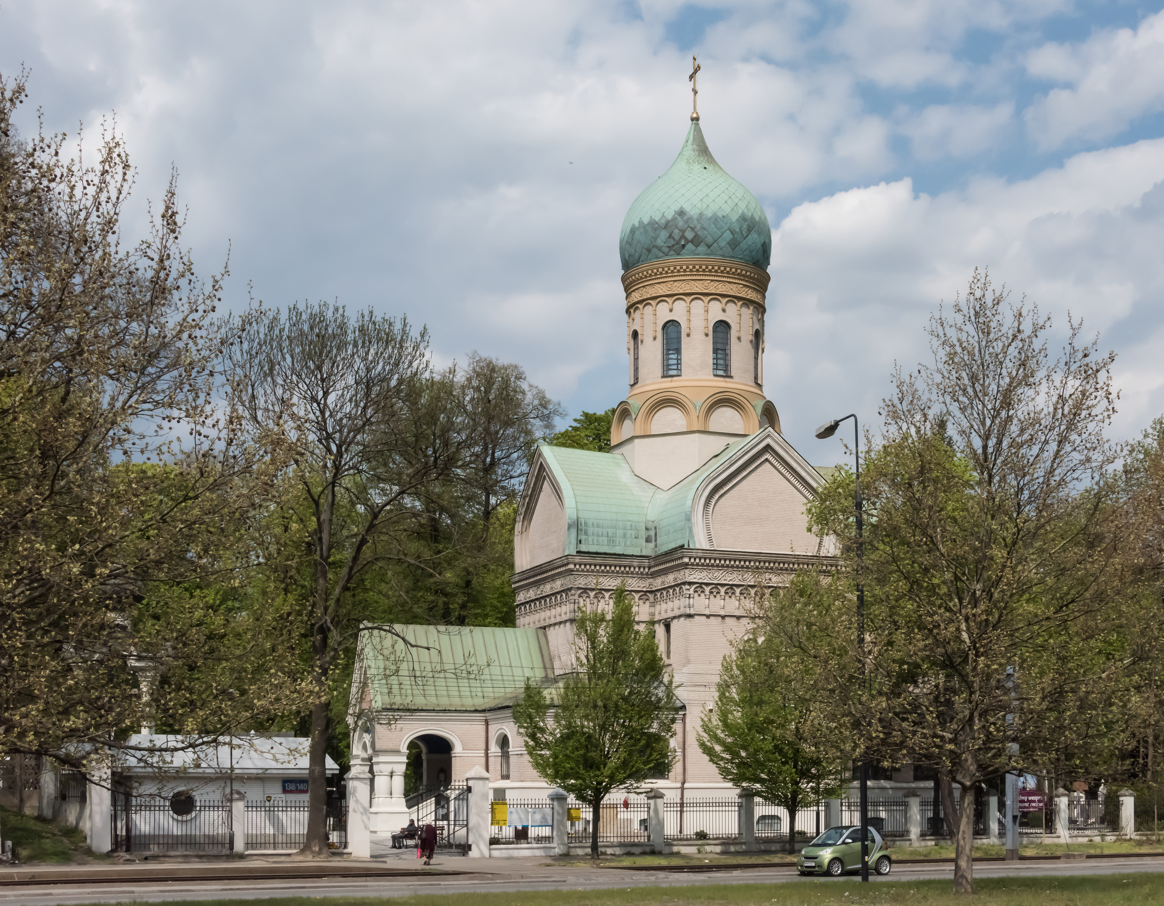 Cerkiew św. Jana Klimaka w Warszawie, widok z ulicy Wolskiej